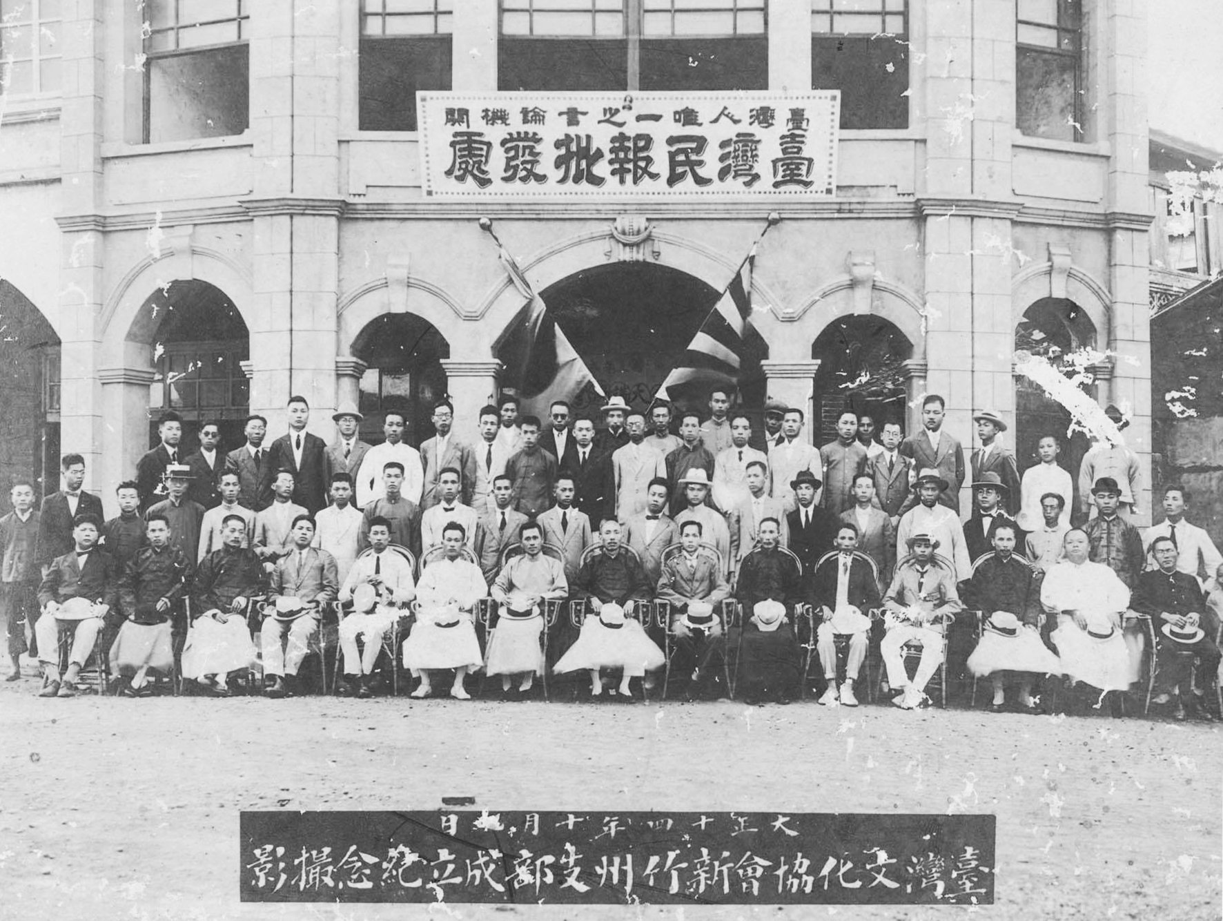 中文（台灣）: 大正14年（1925年）10月10日臺灣文化協會講演團攝於文化協會新竹州支部臺灣民報批發處，前排坐者右五葉榮鐘，右六陳滿盈、右八王敏川、右九林呈祿、右十林獻堂、右十一蔡惠如、右十二楊肇嘉、右十三莊垂勝、右十四蔡式穀。此為文協在新竹舉行的第一次講演會，自此開啟新竹市之文化運動。